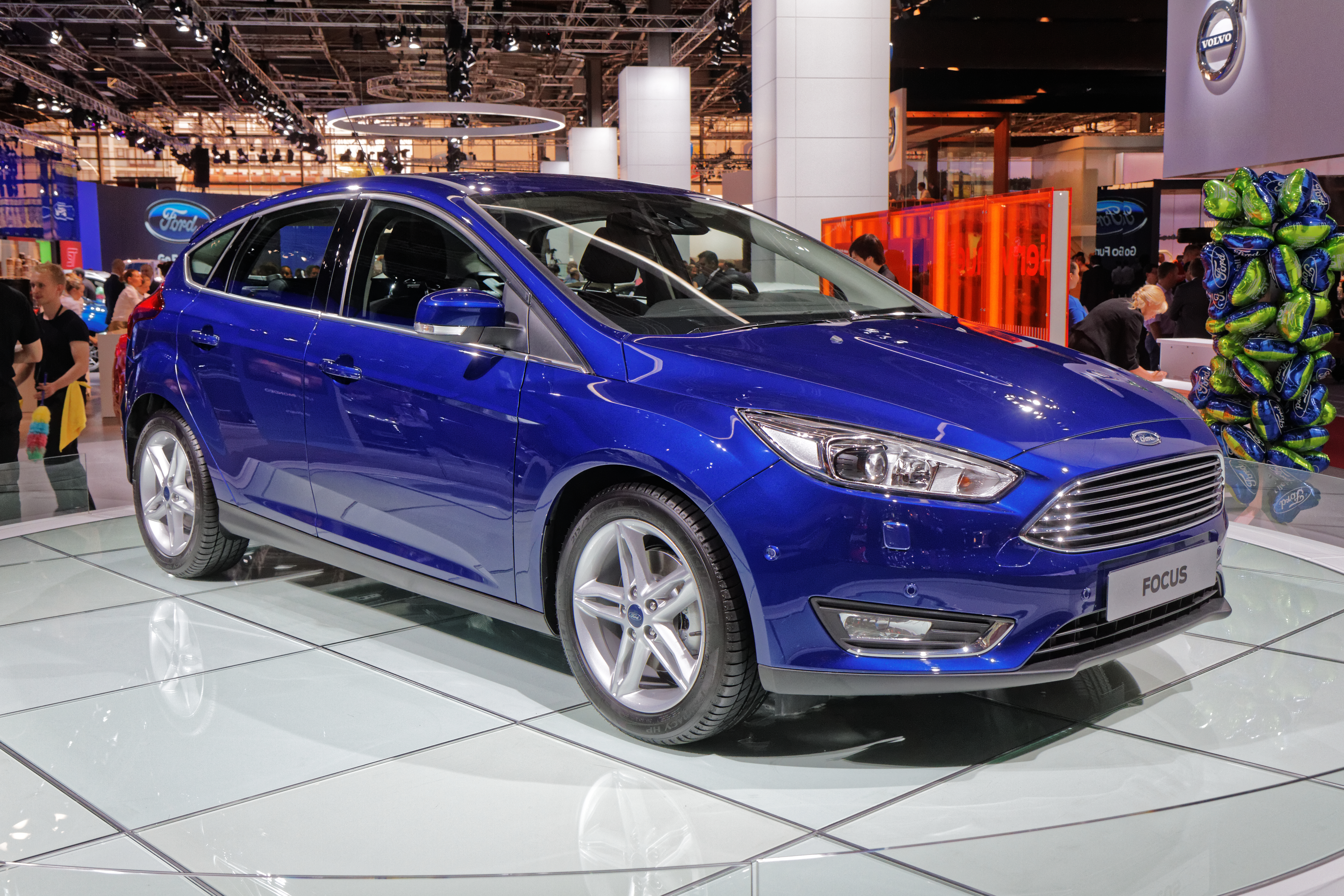 Une Ford Focus présentée lors du mondial de l'automobile de Paris 2014.